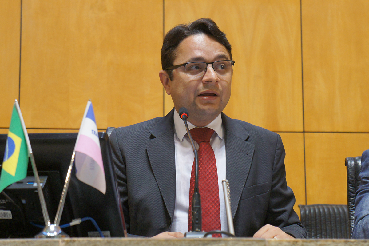 Deputado Vandinho Leite - Sessão Solene em homenagem às Lideranças Comunitárias - 28.05.2019